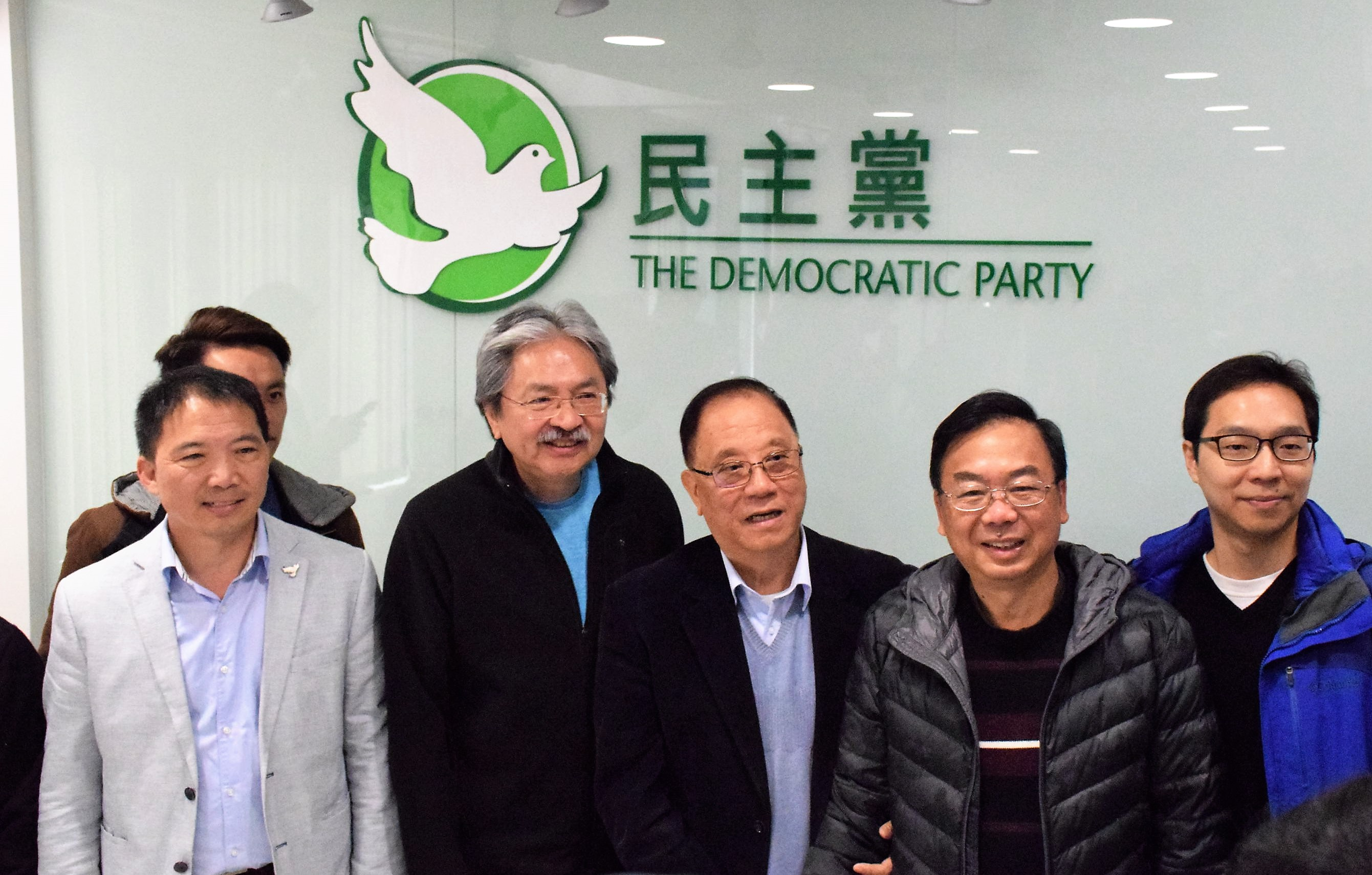 香港特首參選人曾俊華(左二)與多名民主黨選委會面。